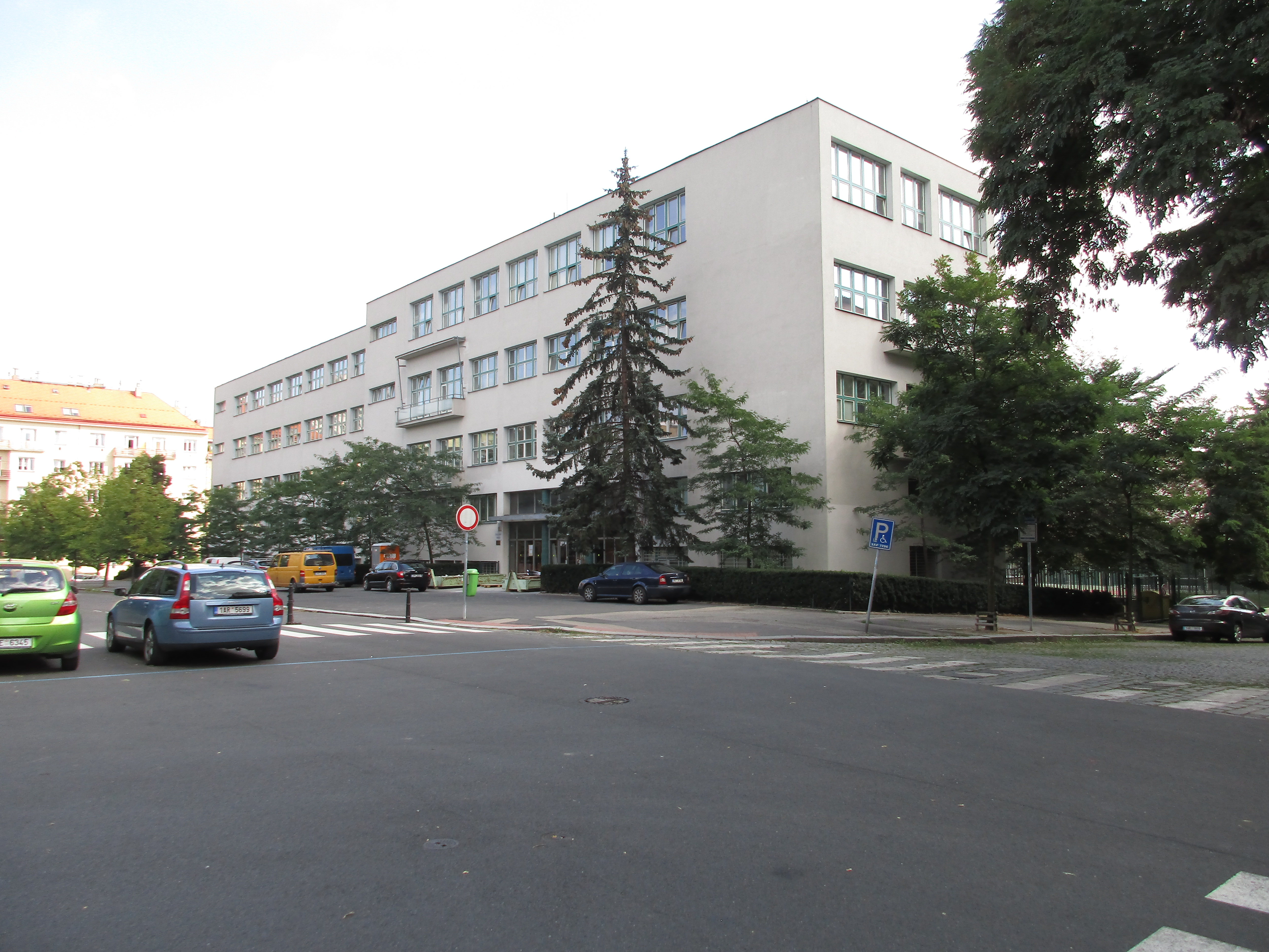 Základní škola, Praha 3 - Vinohrady, náměstí Jiřího z Lobkovic 22.